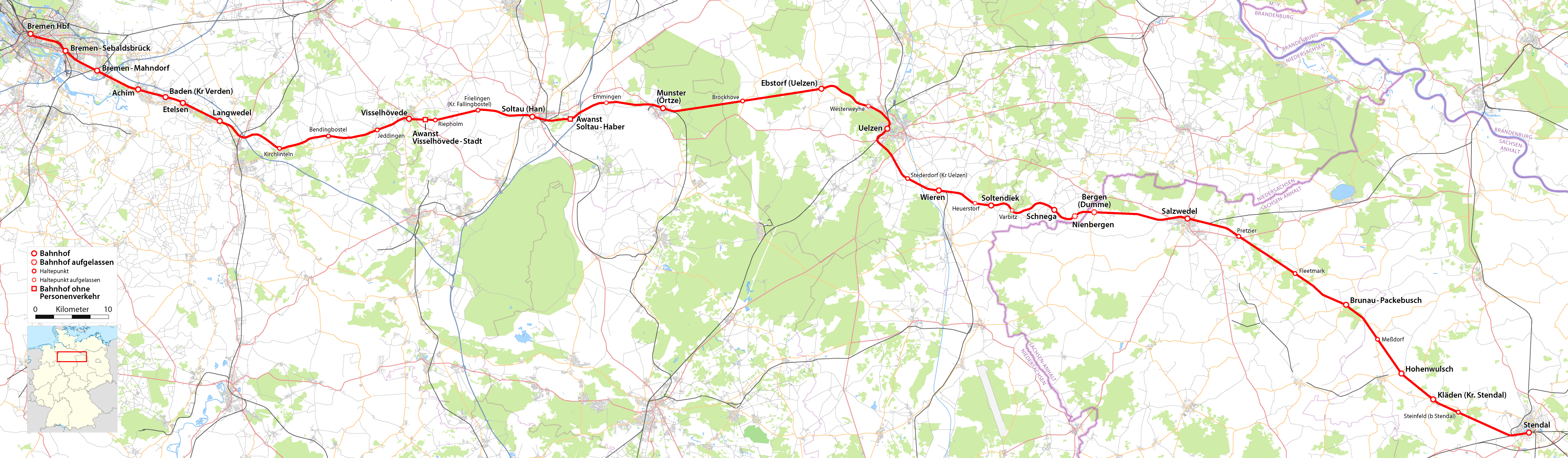 Karte der Amerikalinie (Bahnstrecke)